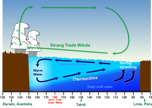 La Niña Conditions. Warm water is further west than usual.